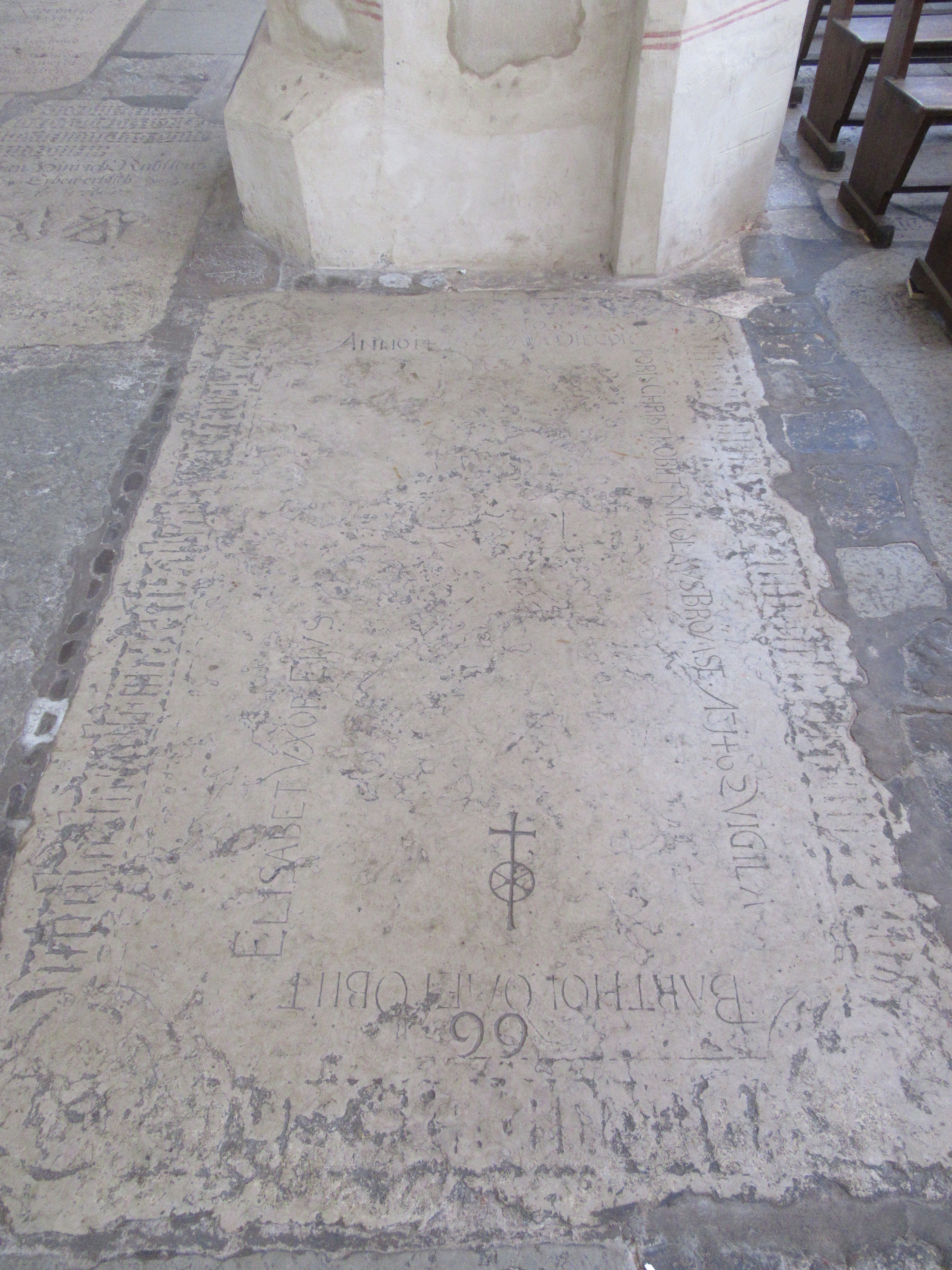 Grabplatte von Nicolaus Brömse (+ 1443) und seiner Frau Elisabeth, geb. Blomenrod, St. Katharinen, Lübeck (LÜKA 24)